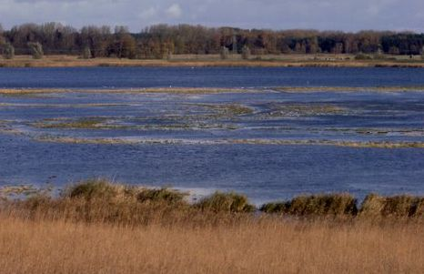 Blick von Westen auf den Großen Wotig. Peenestrom. Mecklenburg-Vorpommern.